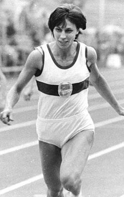 Factual corrections and alternative descriptions are encouraged separately from the original description. Additionally errors can be reported at this page to inform the Bundesarchiv. Original historic description: Marita Koch, Silke Gladisch ADN-ZB Häßler 18.6.83 re-Karl-Marx-Stadt: 34. DDR-Meisterschaften in der Leichtathletik - 3.Tag- Die 26jährige Weltrekordhalterin Marita Koch (SC Empor Rostock) sorgte am Abschlußtag der Titelkämpfe mit 21,82 s über 200 m für das beste Resultat. Im Hintergrund ihre Klubkameradin Silke Gladisch, die Dritte in 22,71 s wurde.